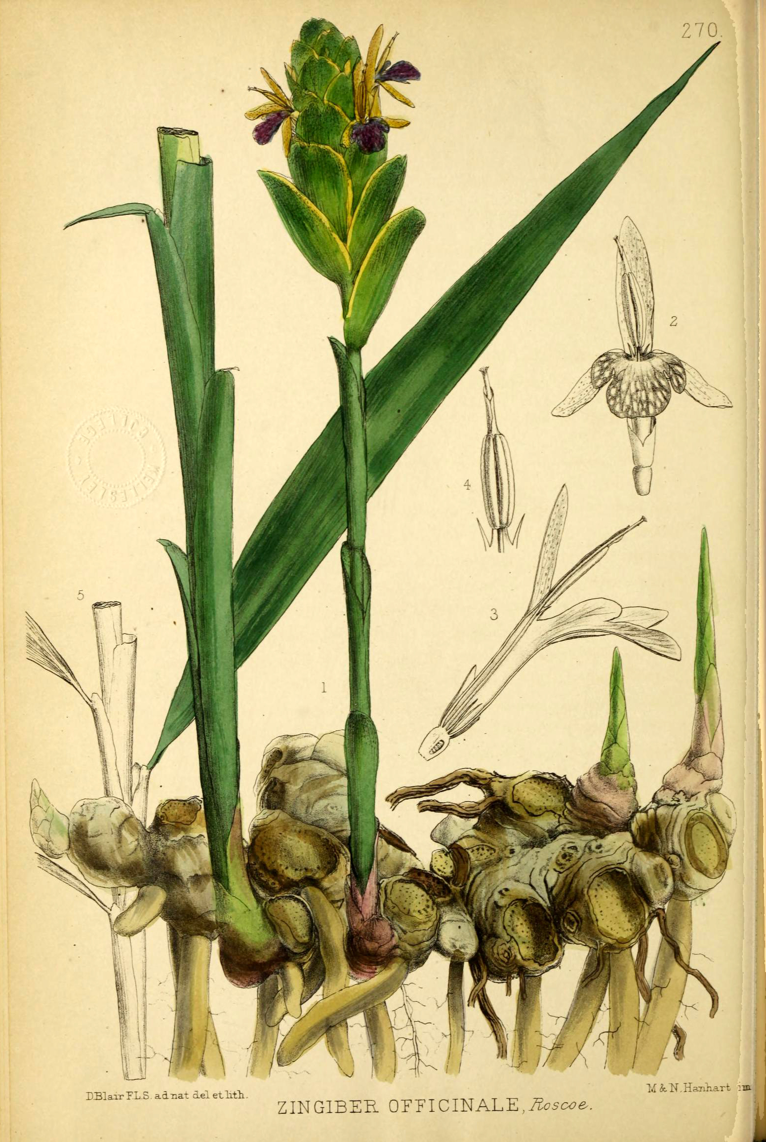 Abbildung von Zingiber officinale